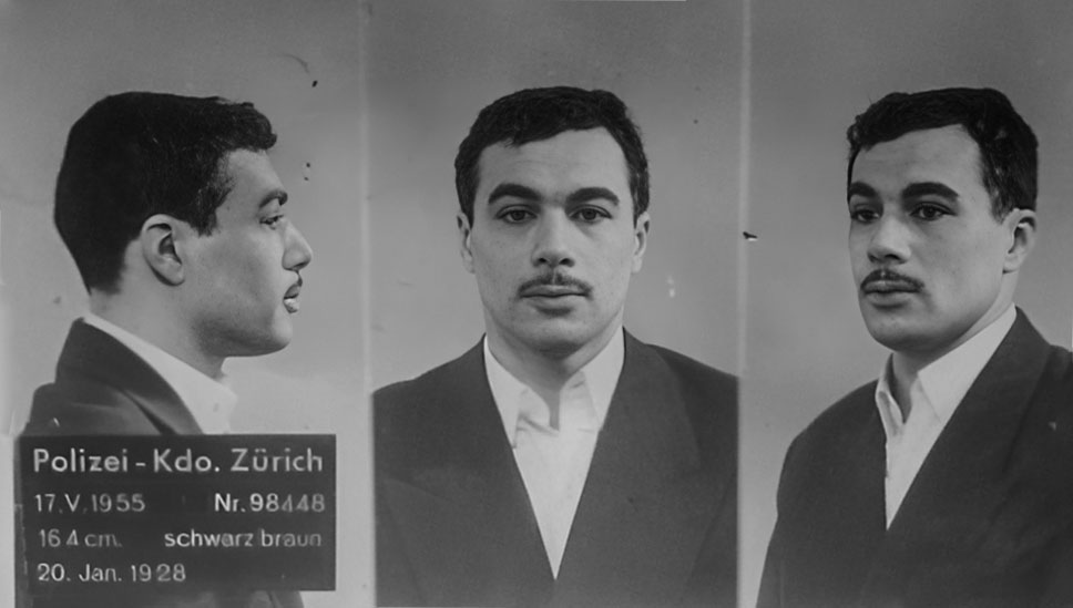 Yacef Saadi lors de son arrestation en Suisse